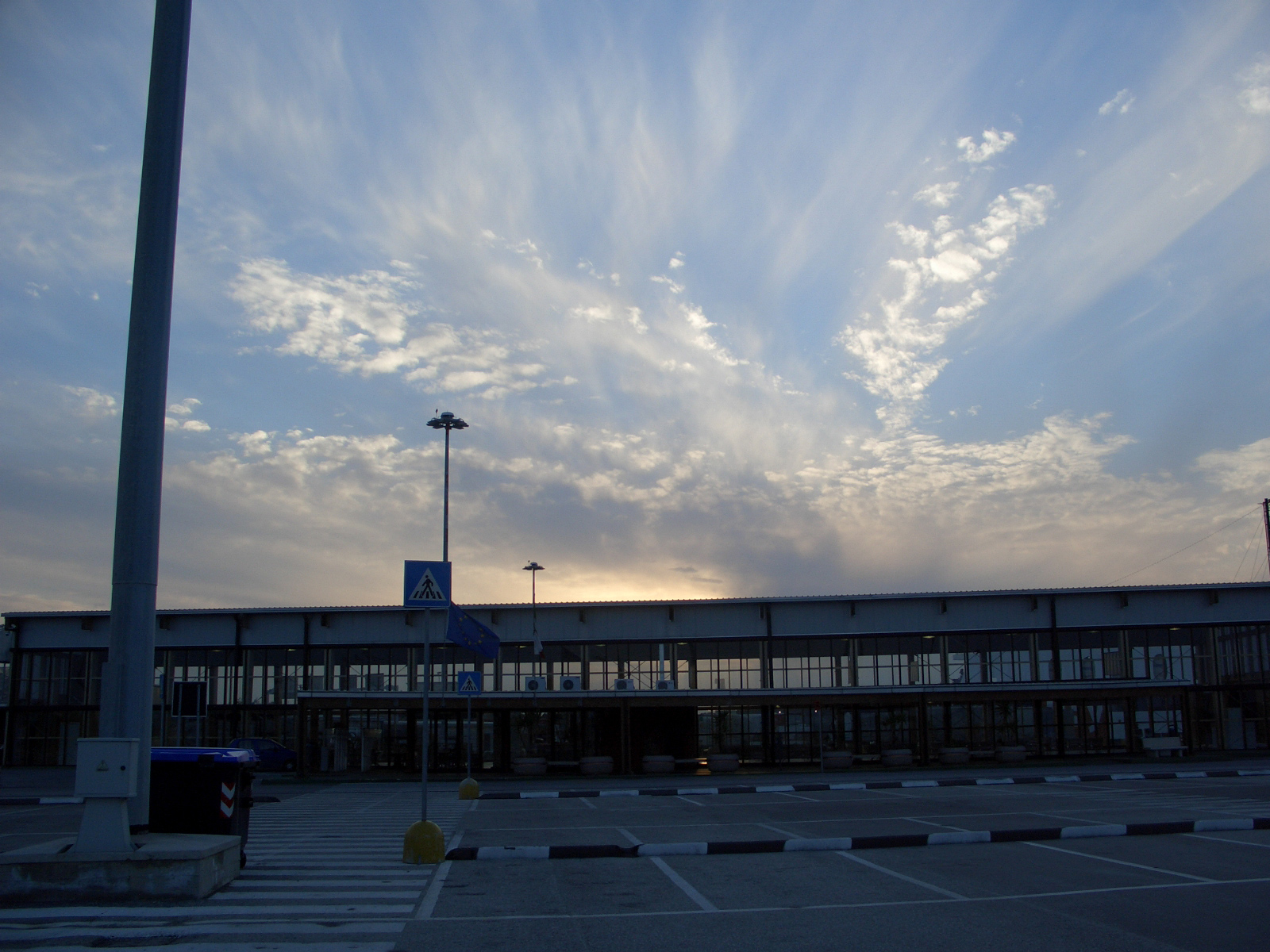 Brindisi, Italia